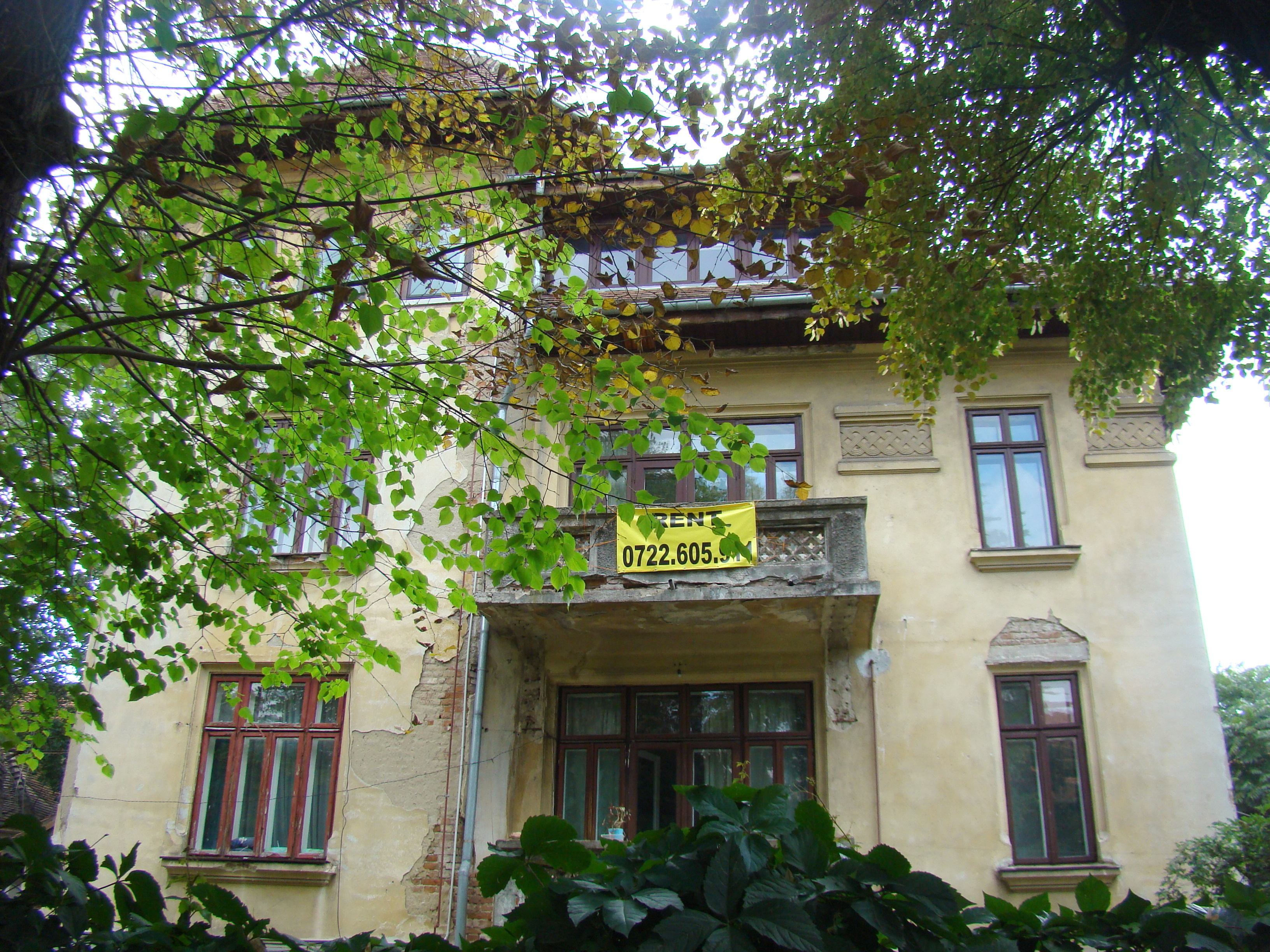 Casă monument istoric, str.Londra, nr.37